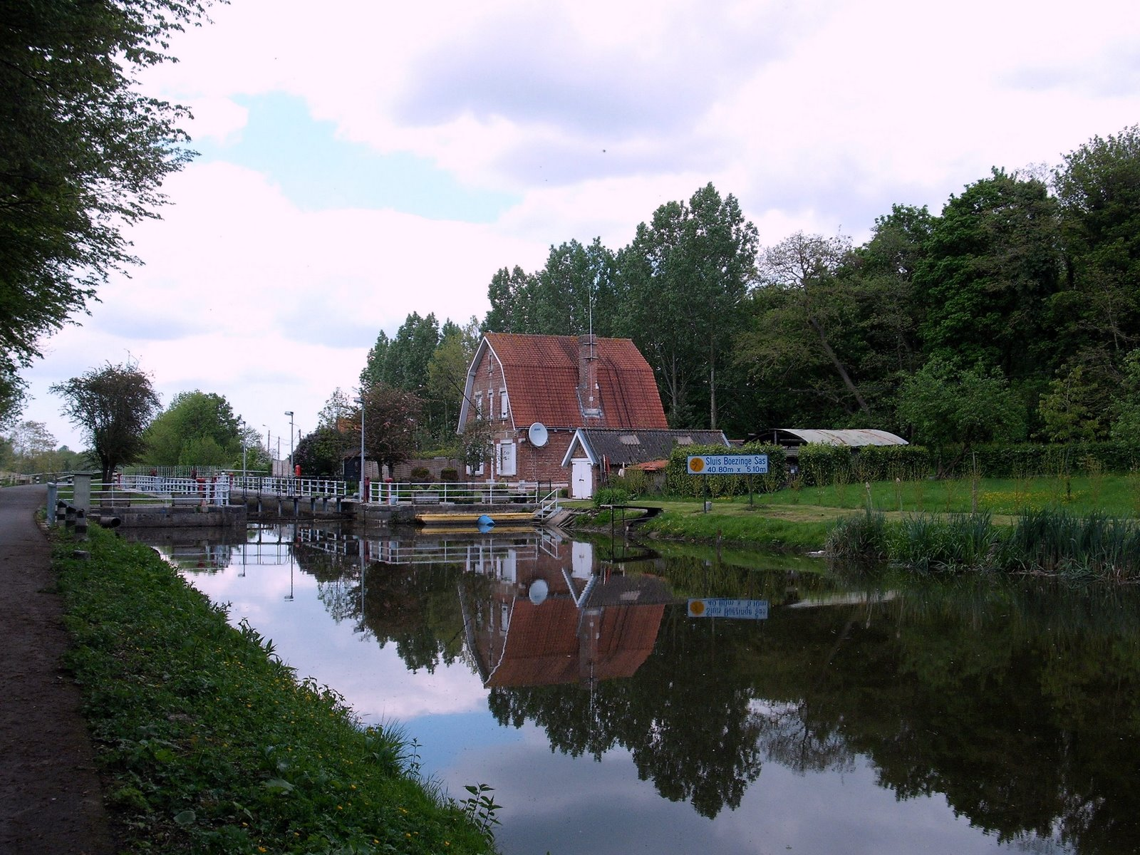 Boezinge - Canal d'Ypres